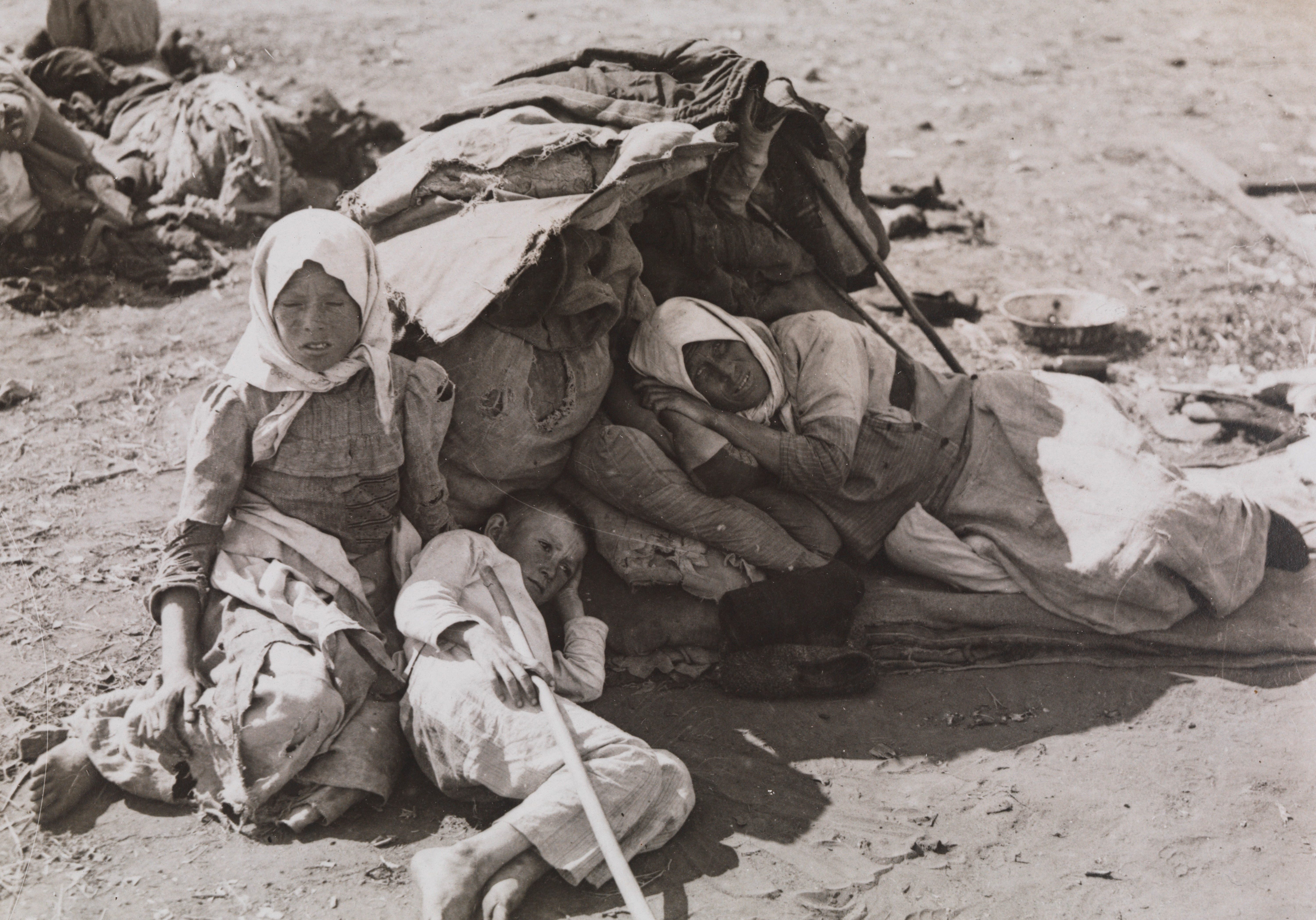 En kvinne med to barn venter på transport fra sultrammede områder. Depicted place: Russia